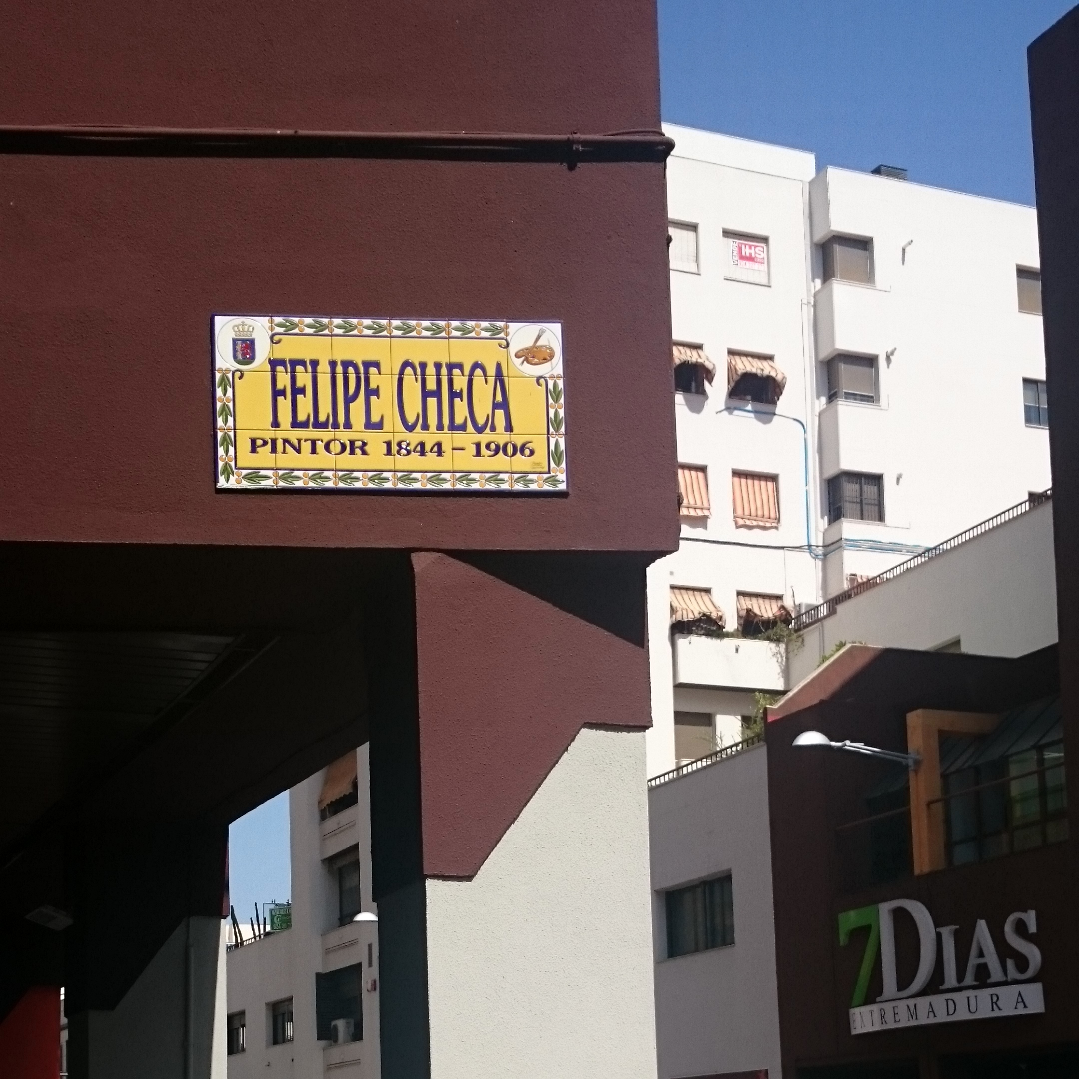 Badajoz. Placa identificativa de la calle Felipe Checa en su confluencia con la Avda. Juan Carlos I.